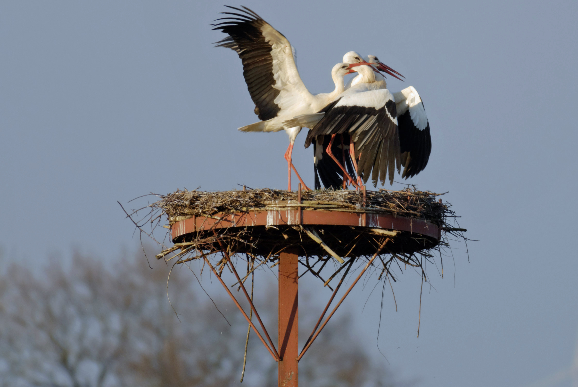 Kämpfende Weißstörche im Naturschutzgebiet Ahsewiesen in Lippetal im Kreis Soest 42